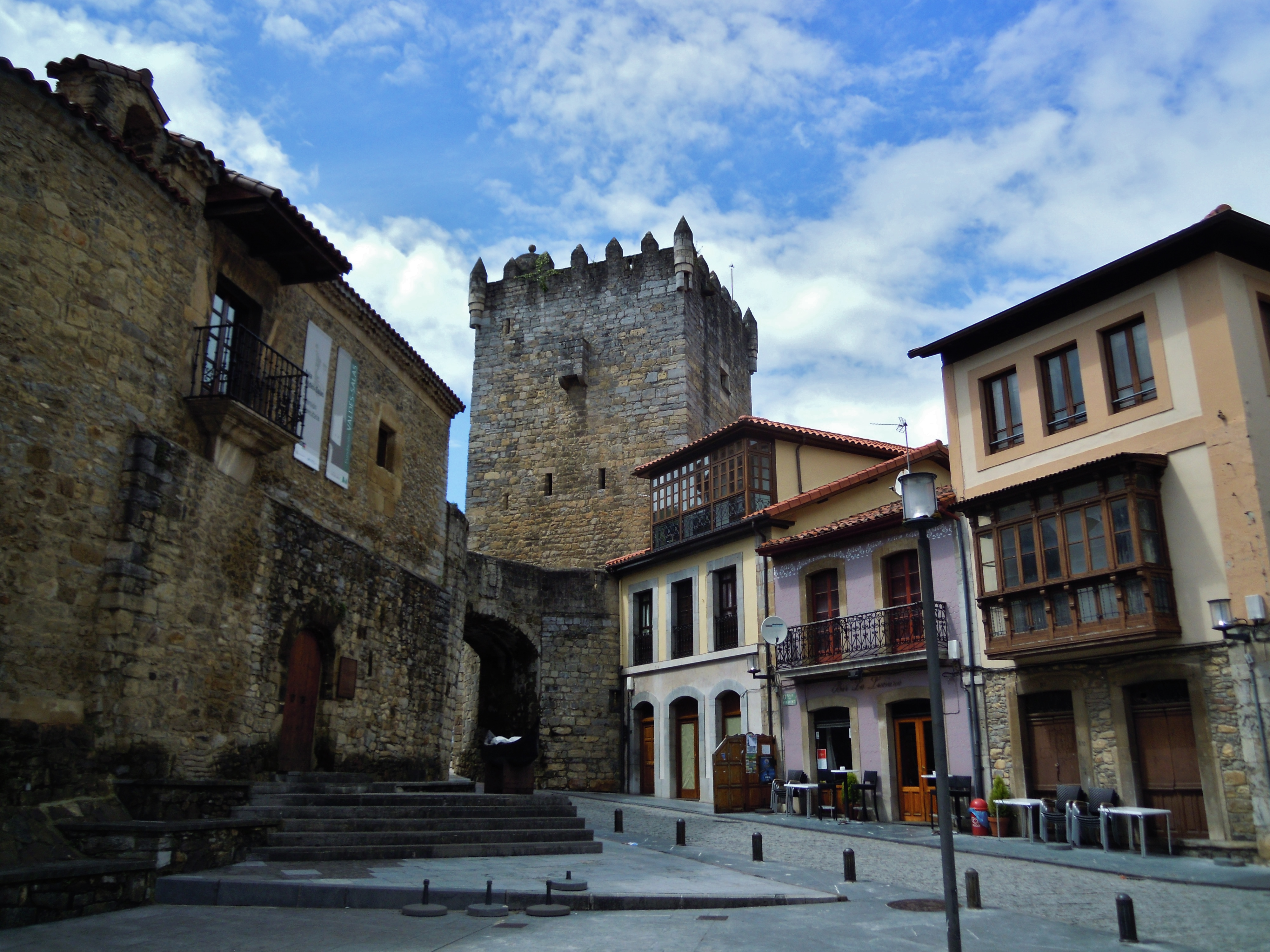 Palaciu Valdés-Salas (Salas)